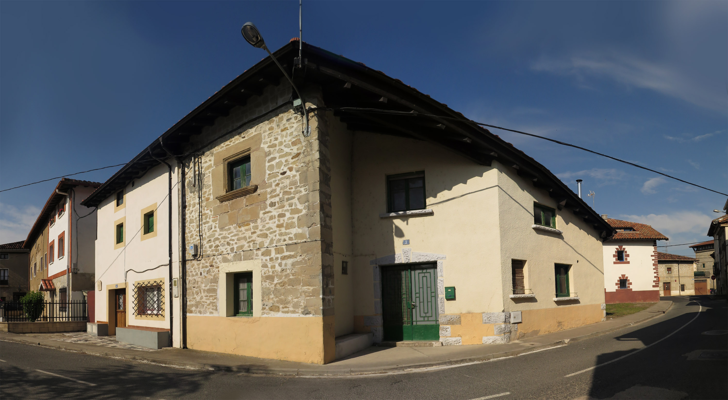 Calle del pueblo de Espejo, en el valle de Valdegobía (Álava, España)